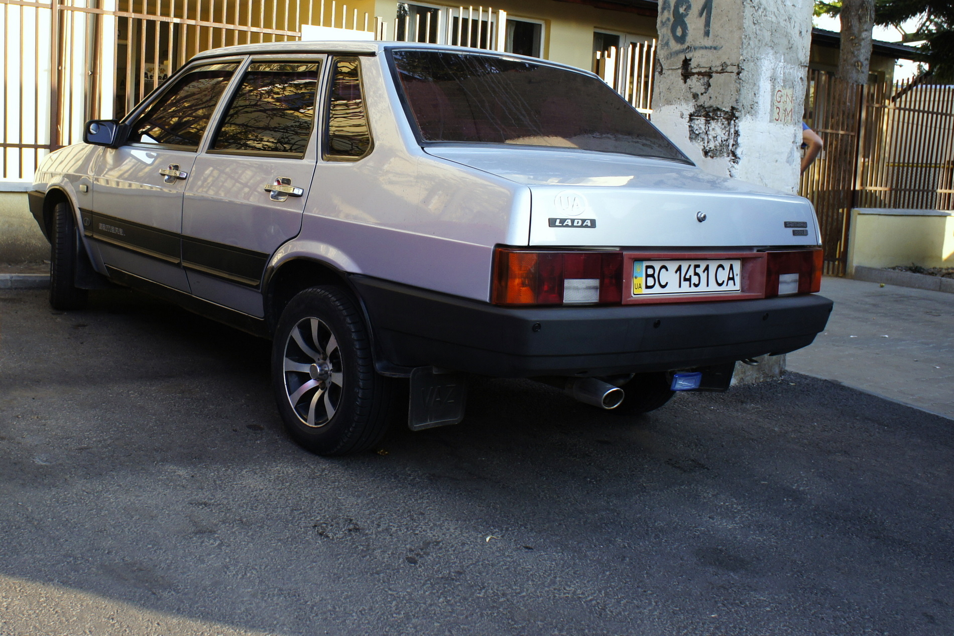 Lada Samara Sedan 1500 (VAZ 21099)